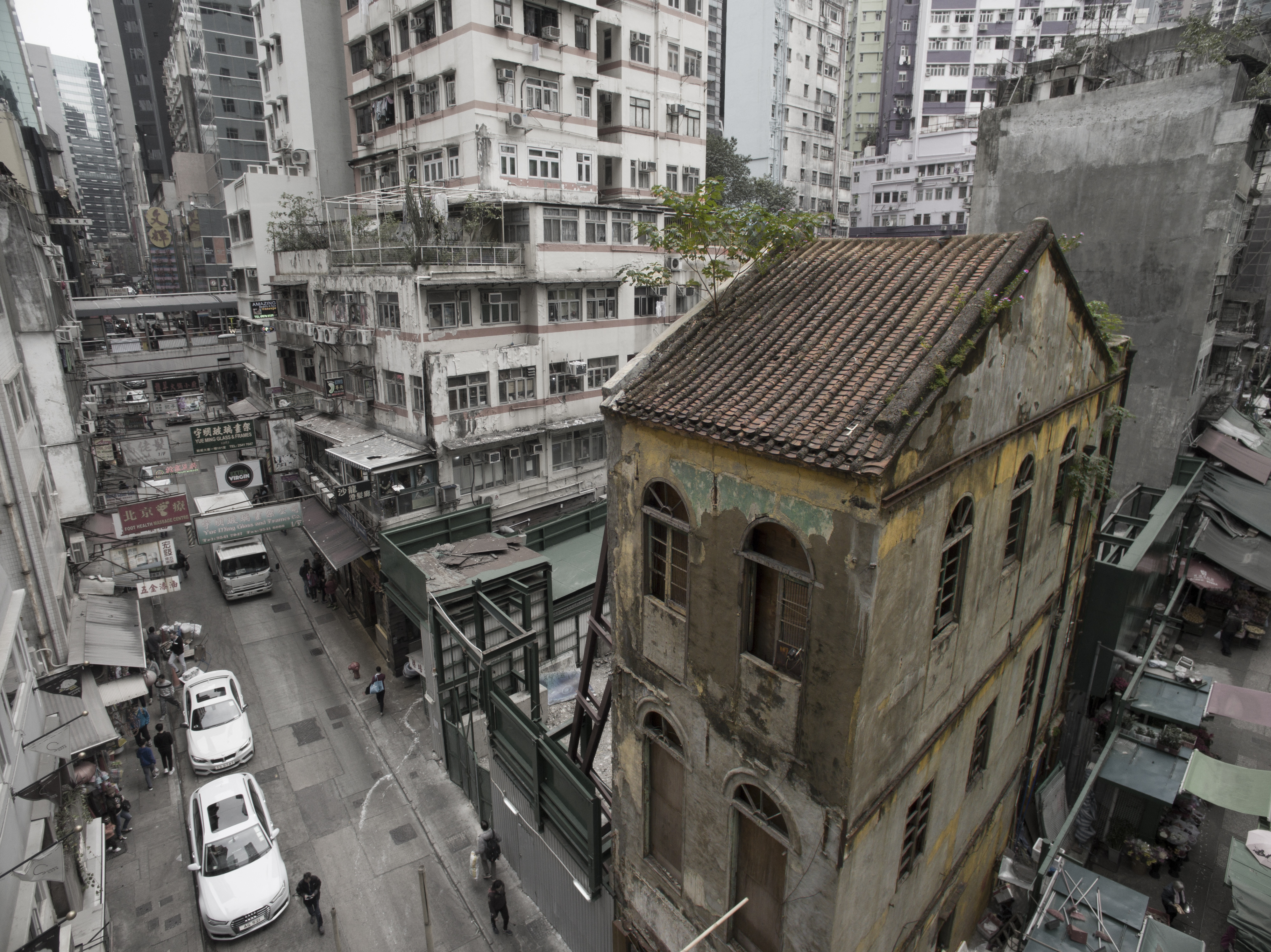 中文（台灣）: 於2016年12月17日，威靈頓街120號航拍。